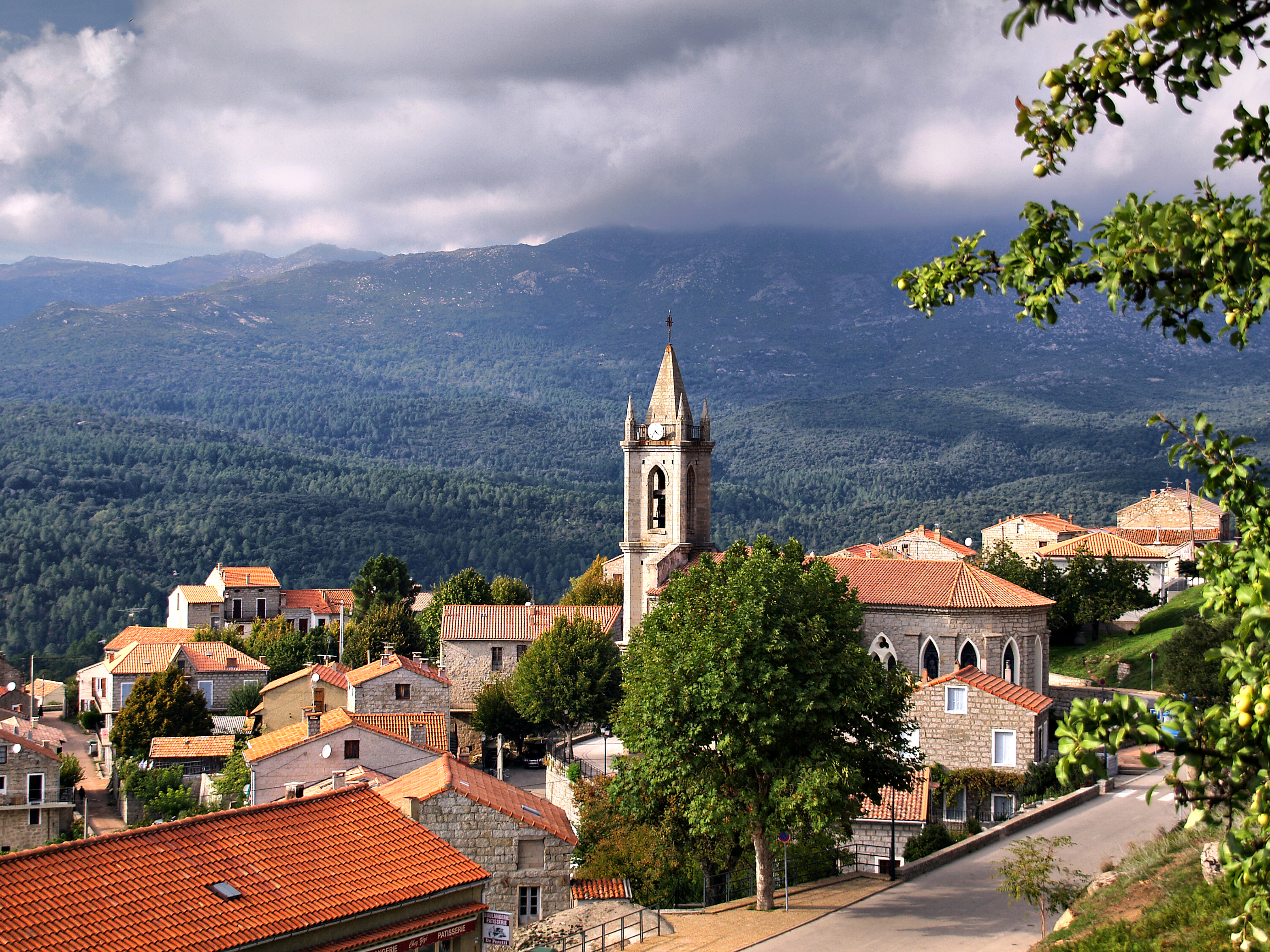 Zonza, Alta Rocca (Corse) - Vue de Zonza avec l'église paroissiale de l'Assomption